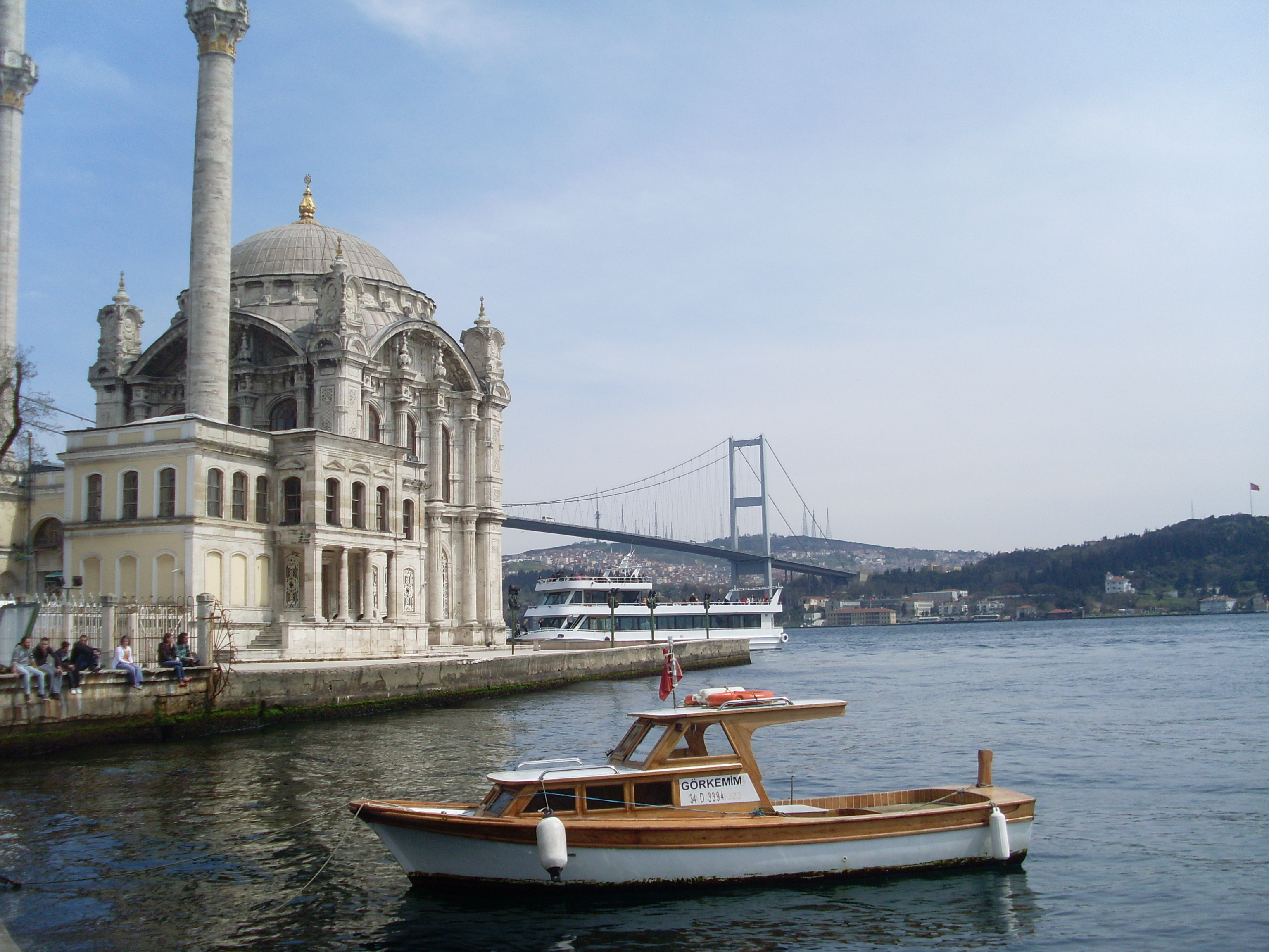 El Bósforo, entre la modernidad y la tradición, Estambul, Turquía, abril de 2011